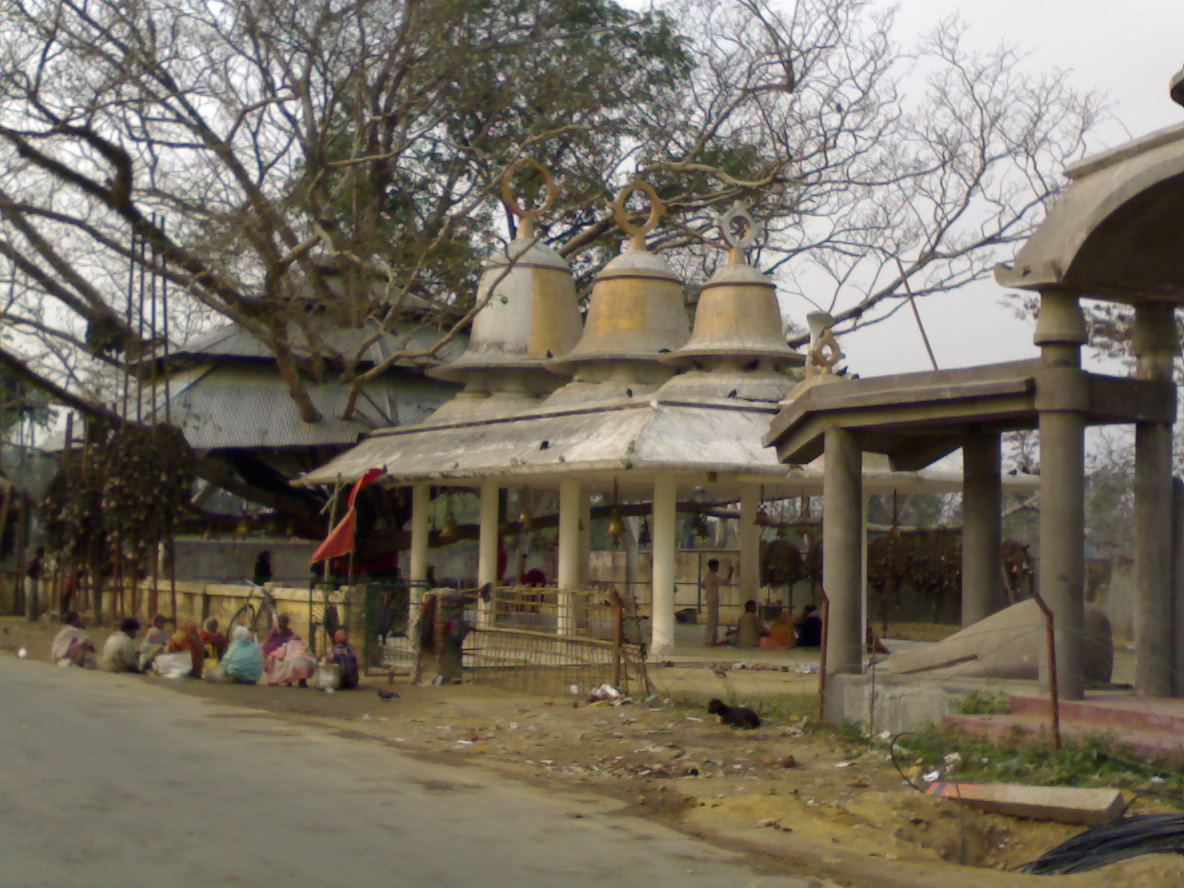 অসমীয়া: তিলিঙা মন্দিৰ